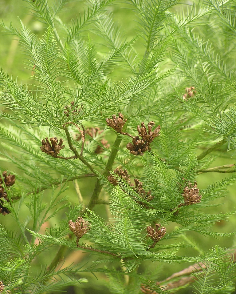 Glyptostrobus pensilis in einem Park in der Nähe von Kusatsu (Shiga-ken, JP).